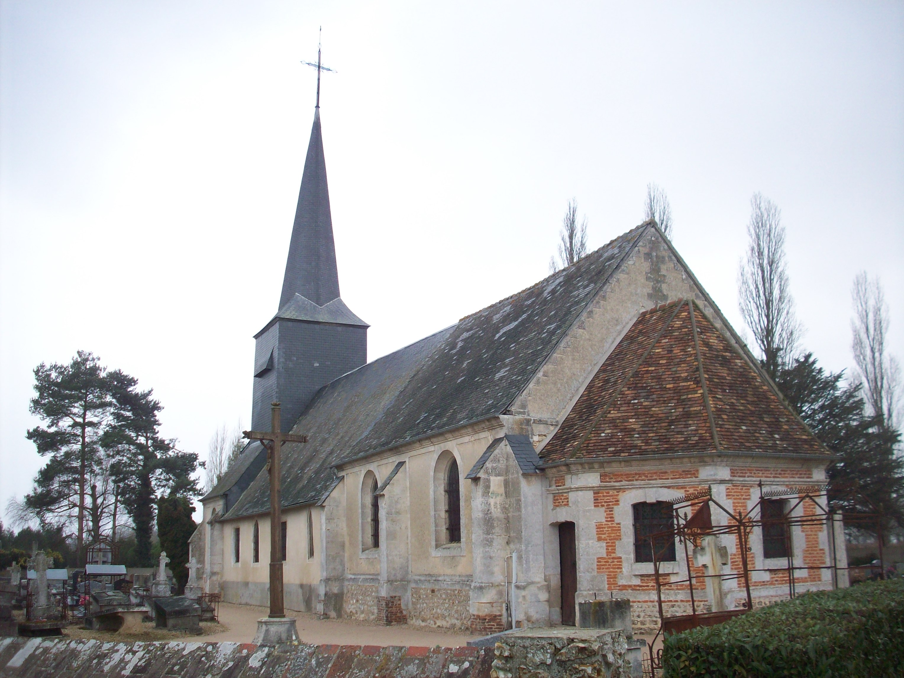 Église de Bosrobert